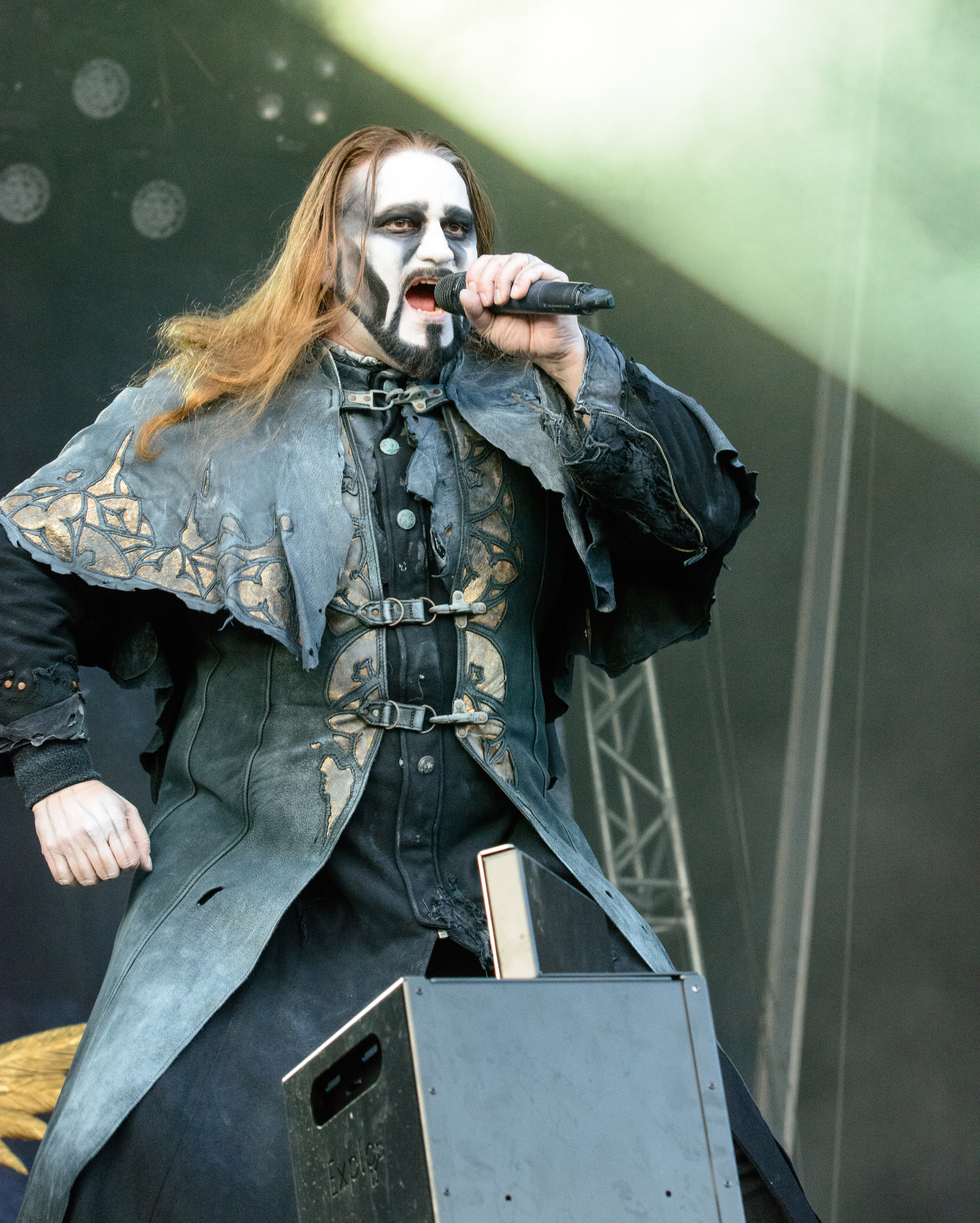 Powerwolf beim Elbriot 2016